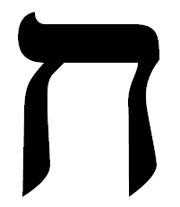 hebrew letter het